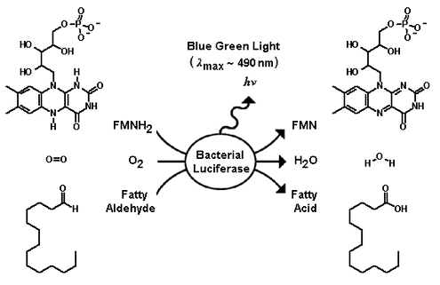 A luminescência bacteriana é frequentemente contínua uma vez que ela utiliza oxigênio e luciferase para oxidar dois substratos, a flavina mononucleotídeo (FMNH2) e aldeído alifático de cadeia longa (RCHO)